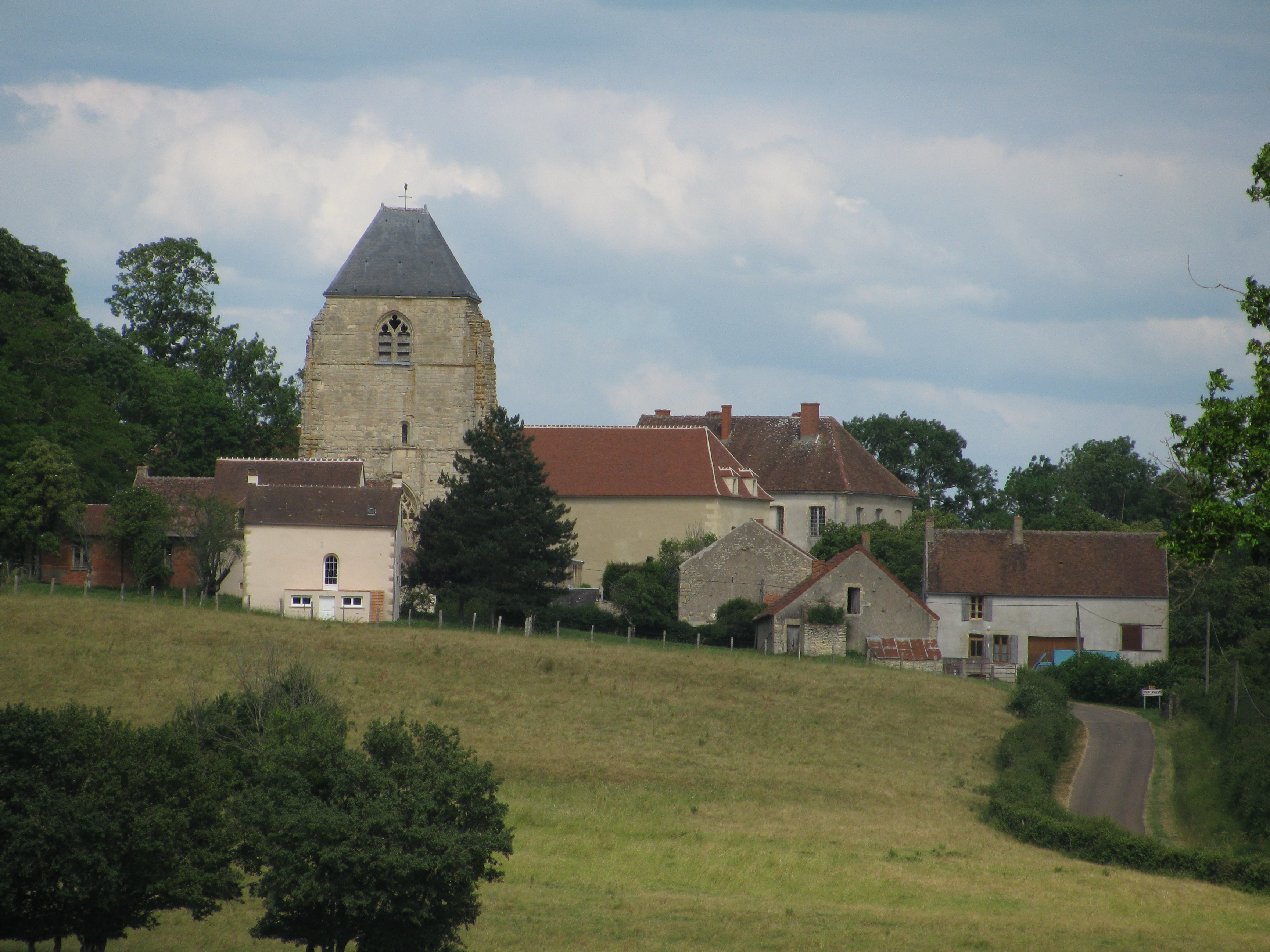 Le village de Challement, dans le Nièvre, France. Au centre, l'église Saint-Hilaire.